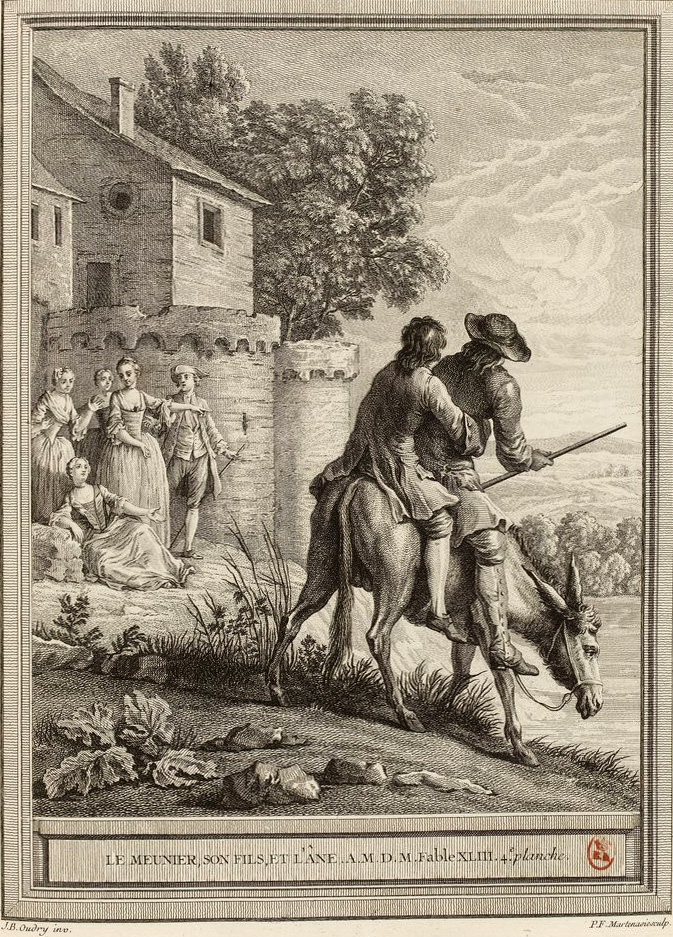 Gravure réalisée par Pieter Franciscus Martenisie d'après un dessin de Jean-Baptiste Oudry représentant la fable Le meunier, son fils et l'âne de Jean de La Fontaine (fable 1 du livre III). Cette gravure est parue dans l'édition complète des fables de La Fontaine, parue en quatre tomes chez l'éditeur Desaint & Saillant, rue saint Jean de Beauvais à Paris, 1755-1759.